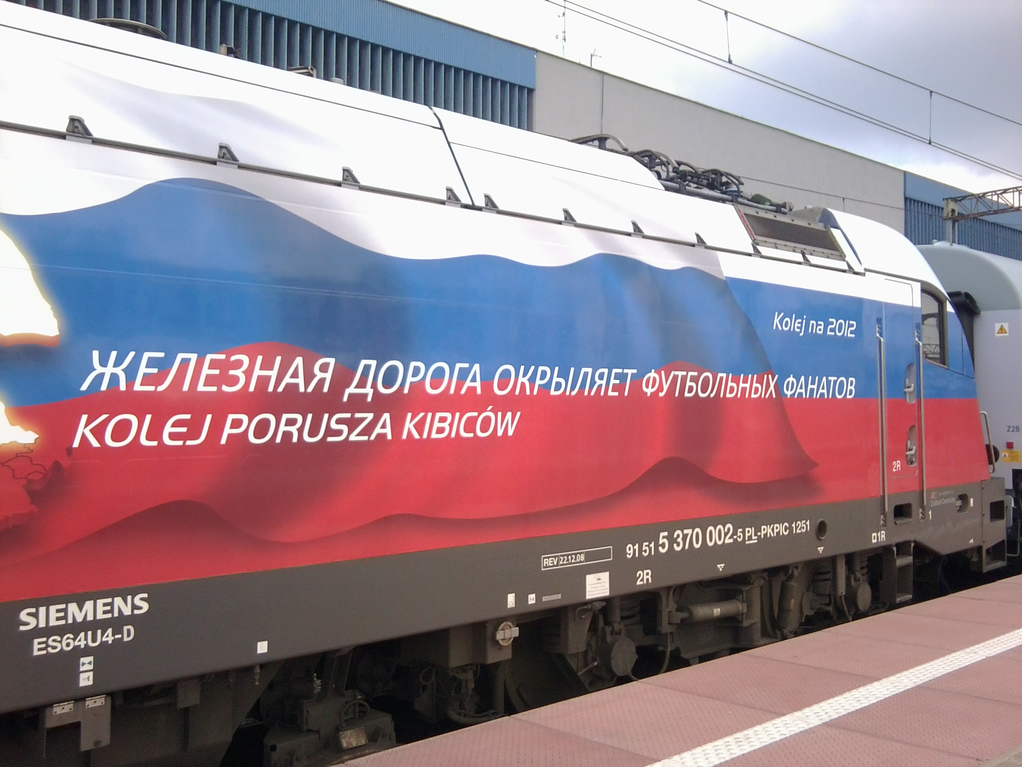 Kolej porusza kibiców w języku rosyjskim.